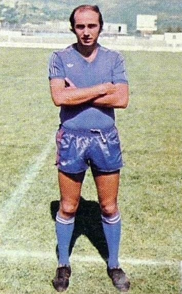 Claude Papi au SC Bastia en 1976, 'Panini Football 1976 - 1977', Panini figurina n°36.